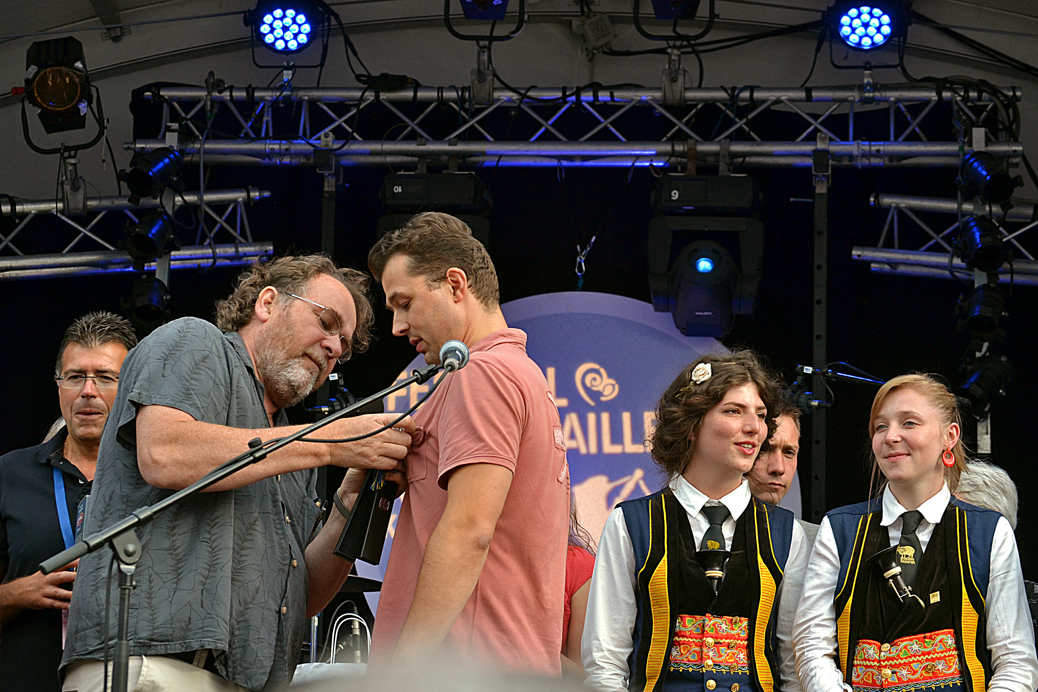 Trophée de la Plume de Paon. Résultats du concours de sonneurs par couples au village Gradlon lors du festival Cornouaille Kemper 2015.